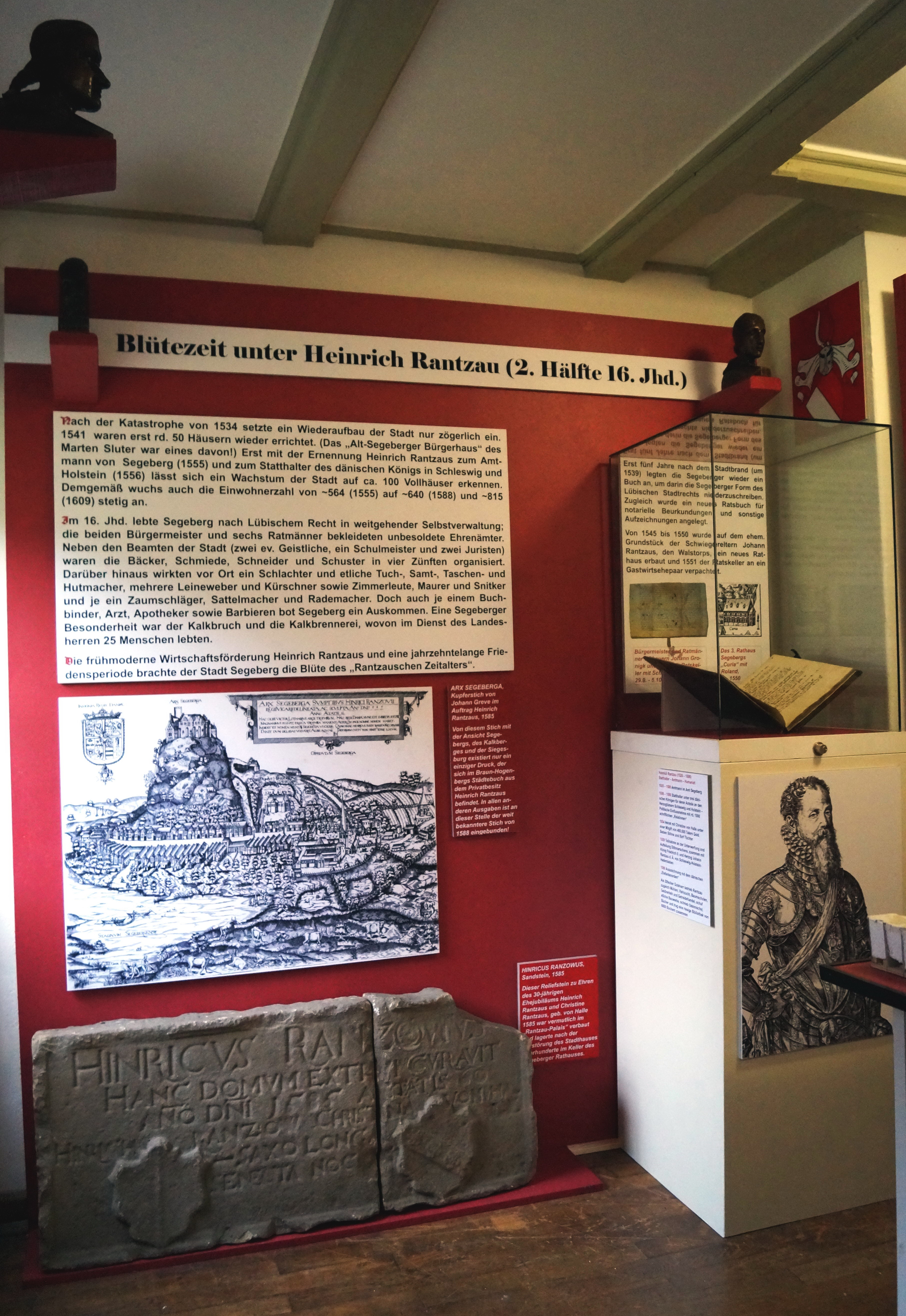 Teilansicht der Ausstellung